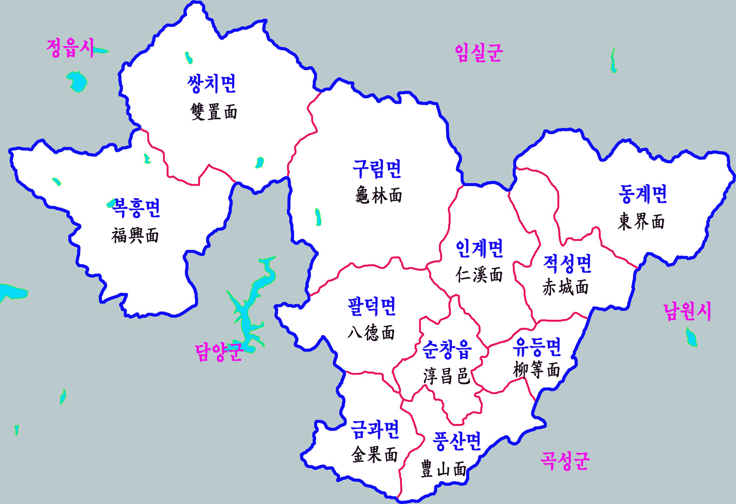 전북 순창군 행정구역도